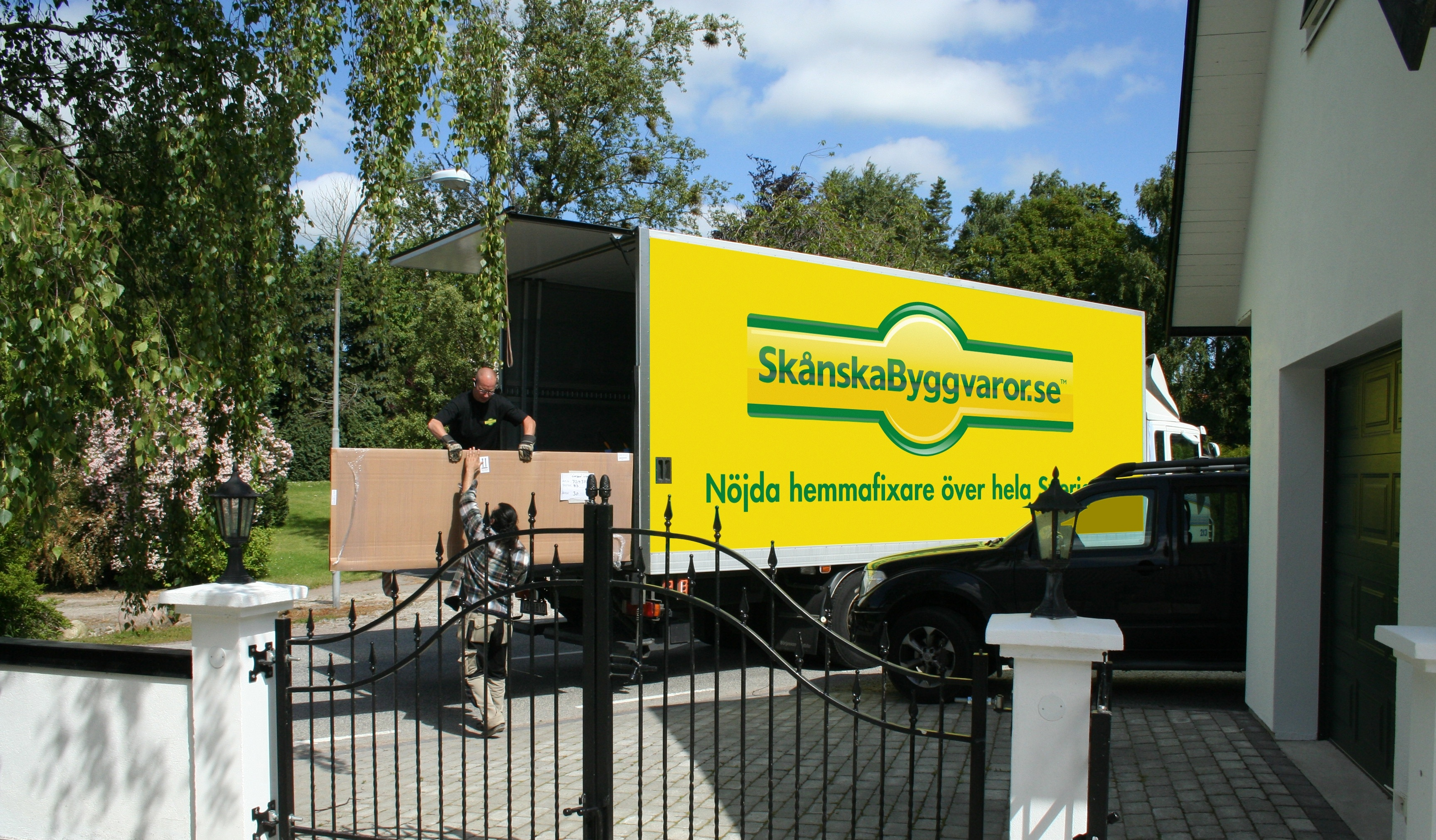 Verksamhetsbild Skånska Byggvaror hemma hos villaägare